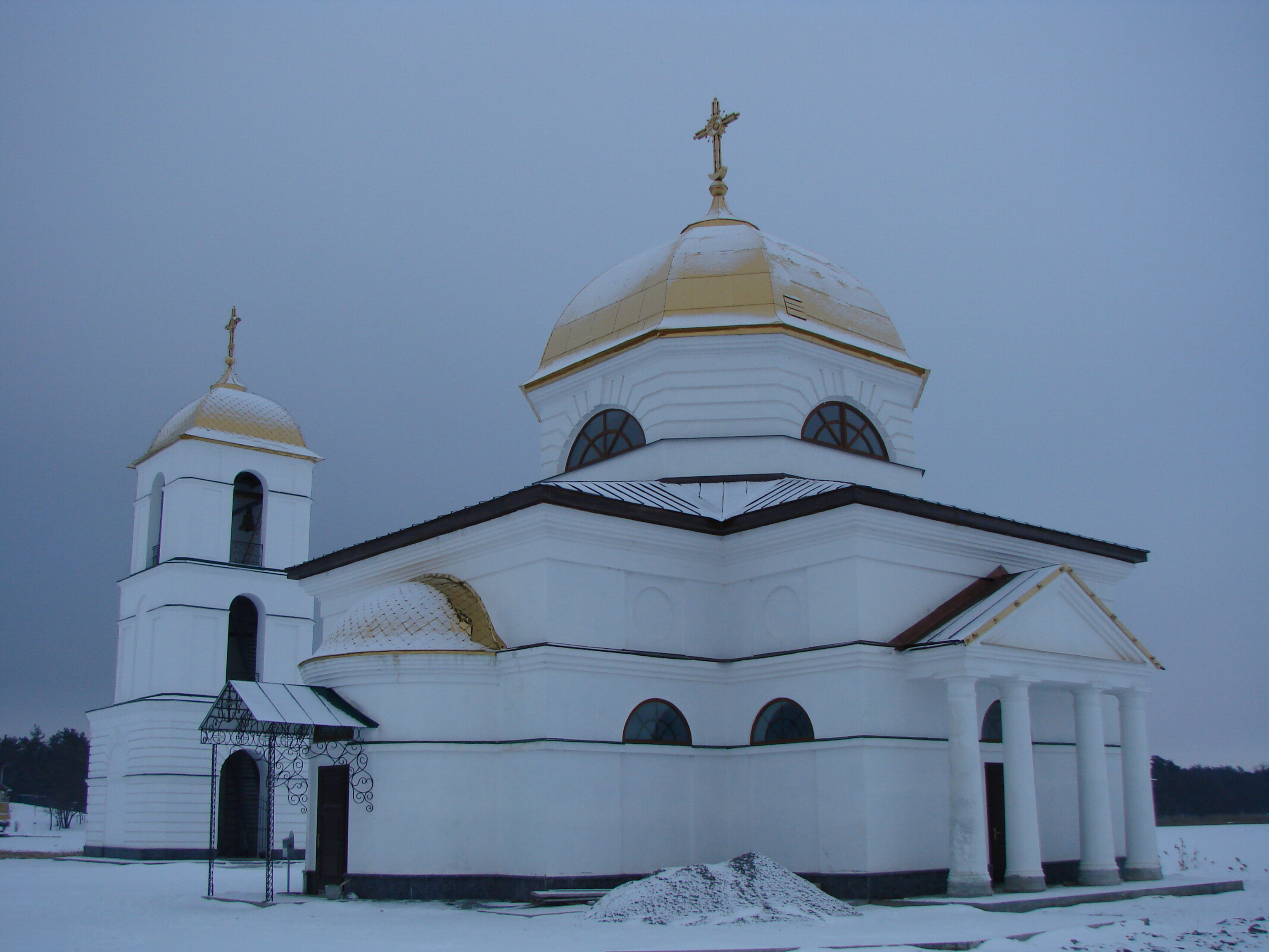 Преображенська церква у Гусинцях